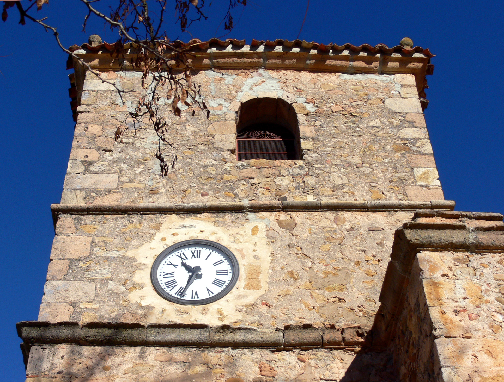 Torre y Reloj de la iglesia de San Martín (sXIX).